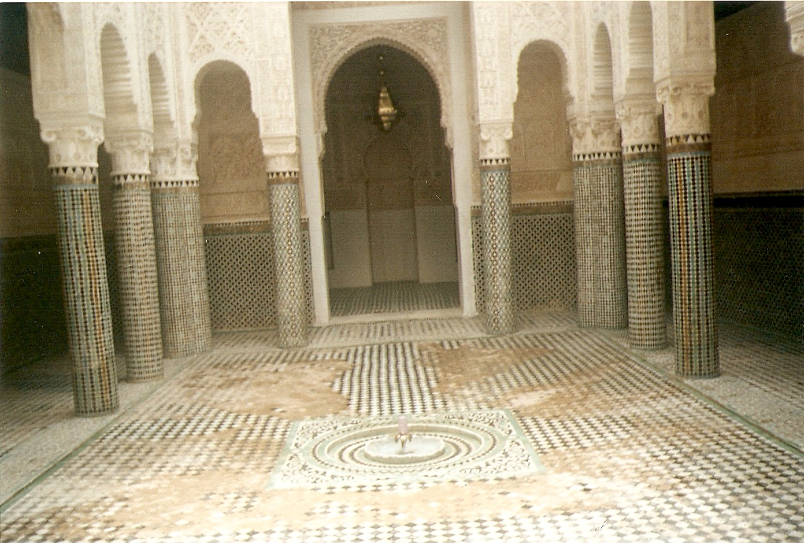 Interieur van de grote moskee in Salé